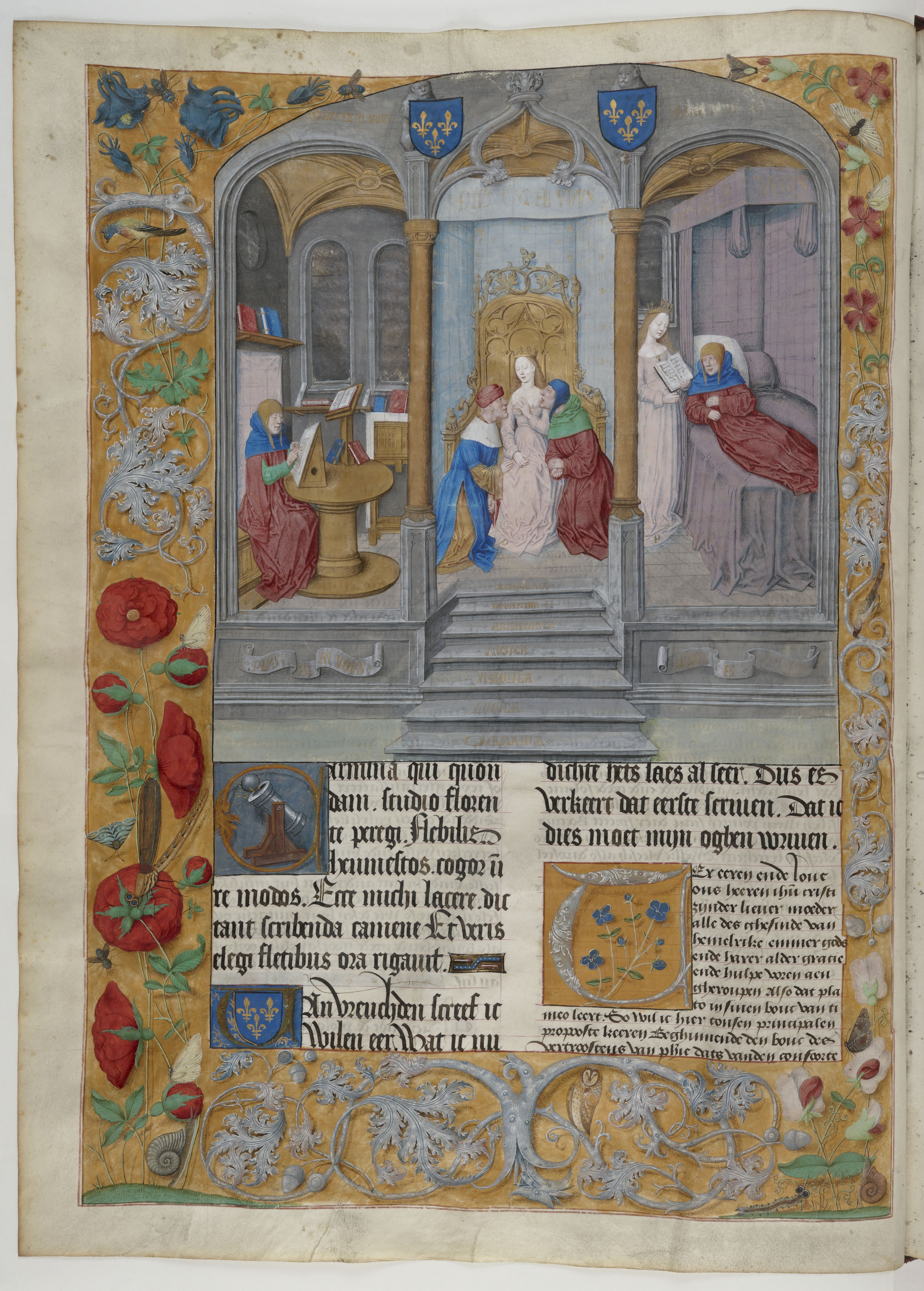 Miniature représentant Boèce , de Consolatione Philosophiae .